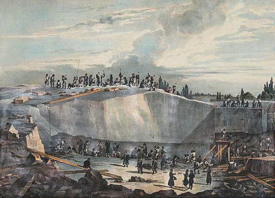 Вид работ в Пютерлакской каменоломне. Литография Бишбуа и Ватто по рисунку О. Монферрана. 1836 г.